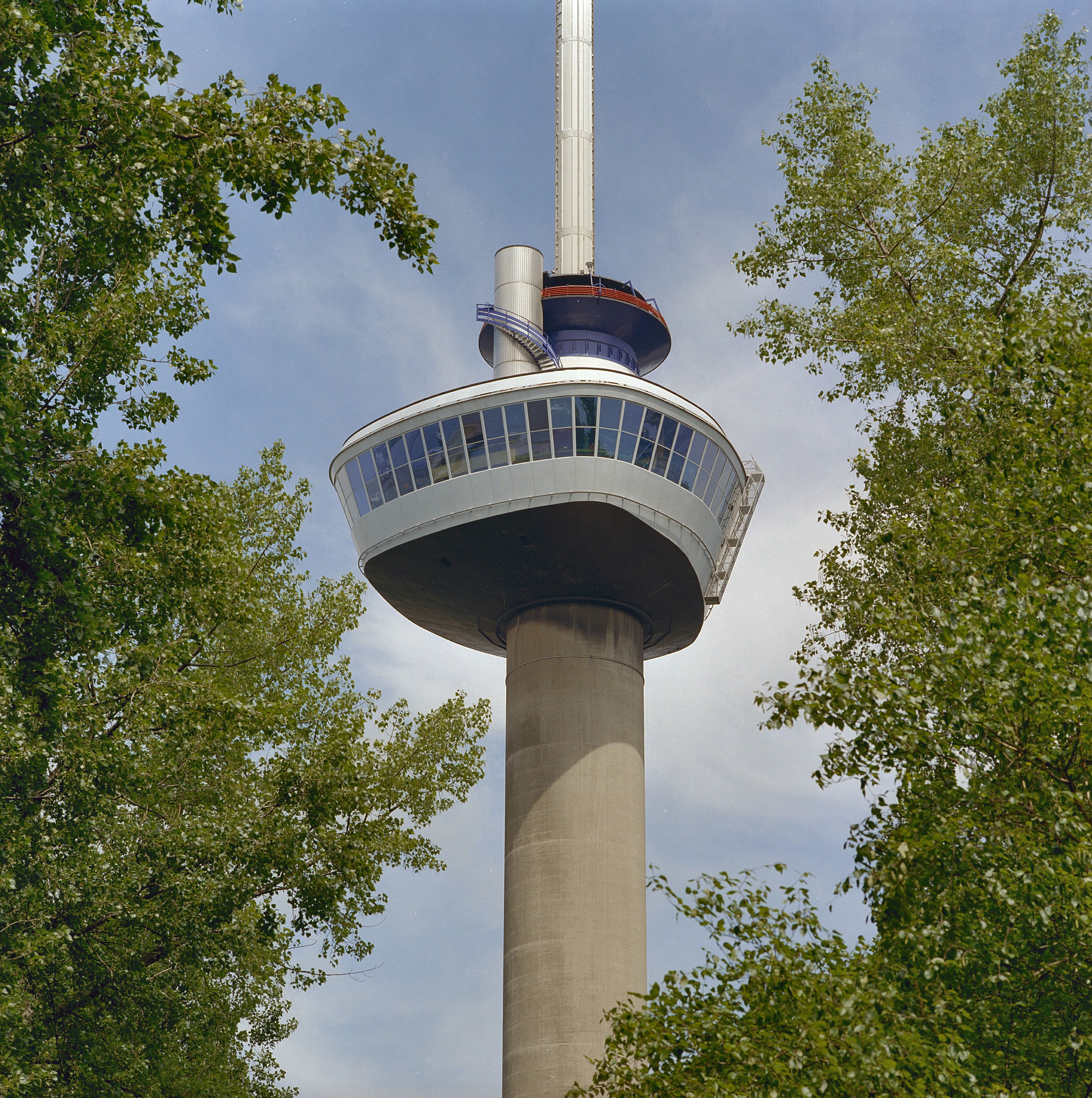 Euromast: Overzicht restaurant gedeelte, kraaiennest (opmerking: Gefotografeerd voor Toonbeelden van de Wederopbouw)